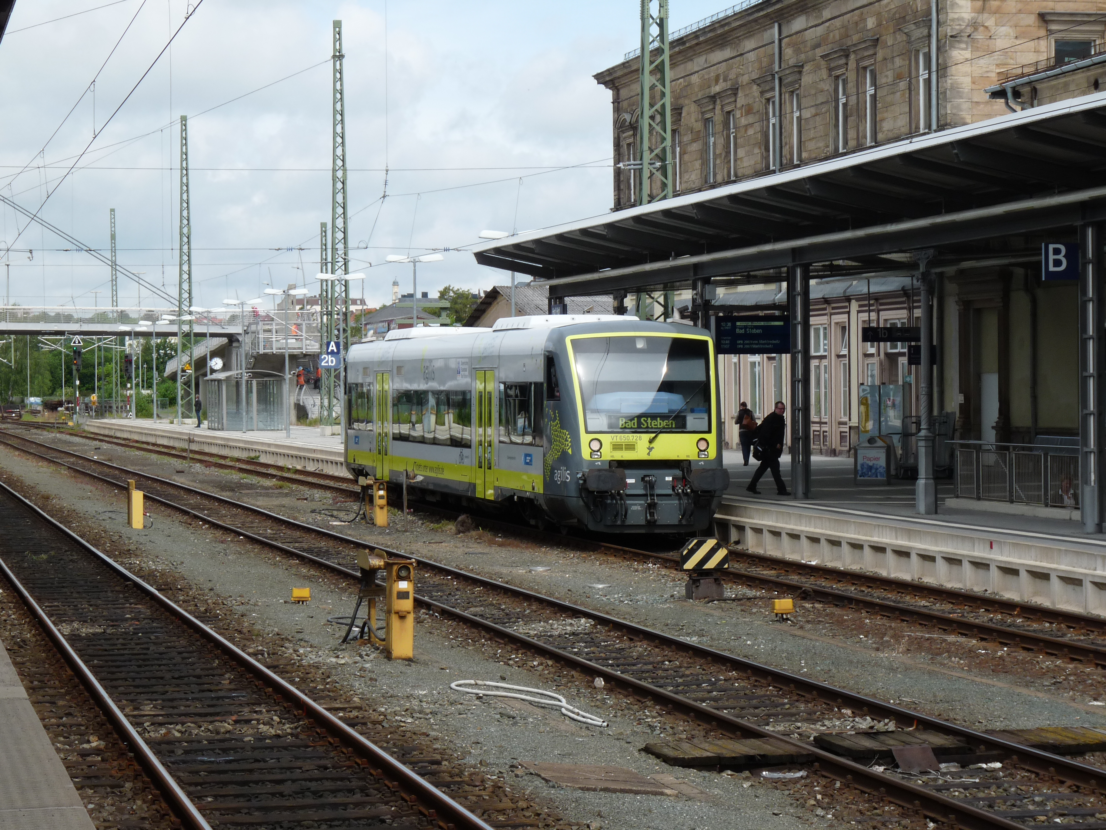 Een lokale trein in station Hof